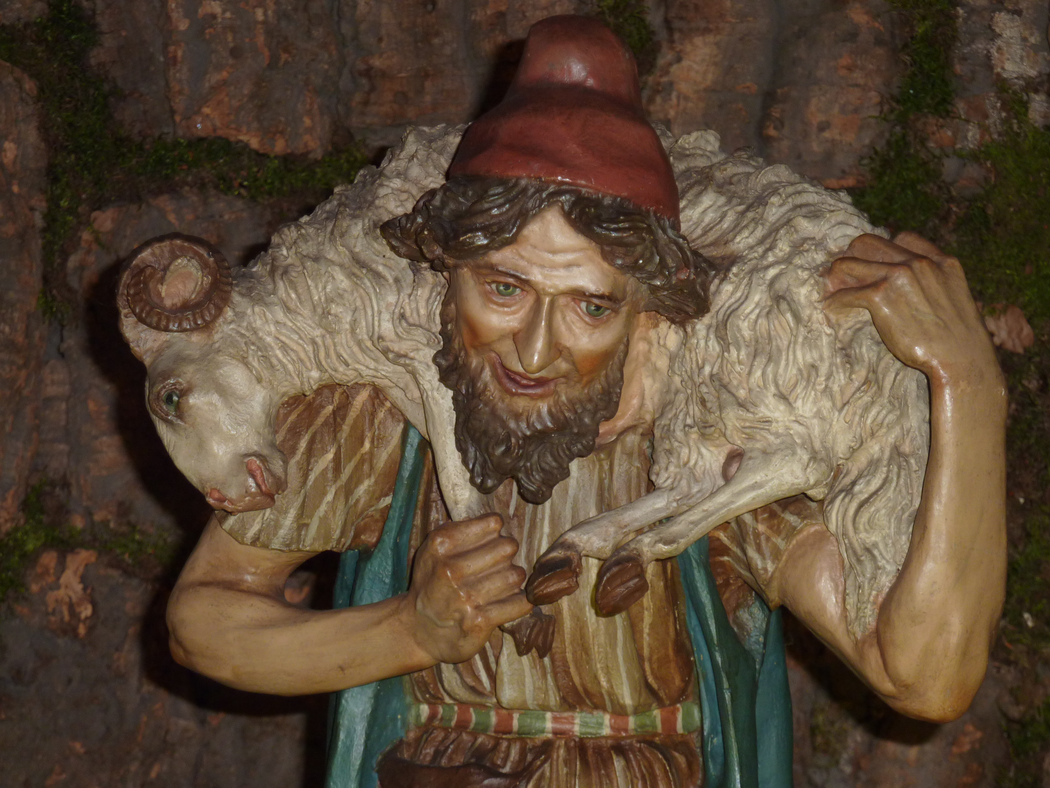 Krippenfigur von Sebastian Osterrieder im Münster St. Paul in Esslingen